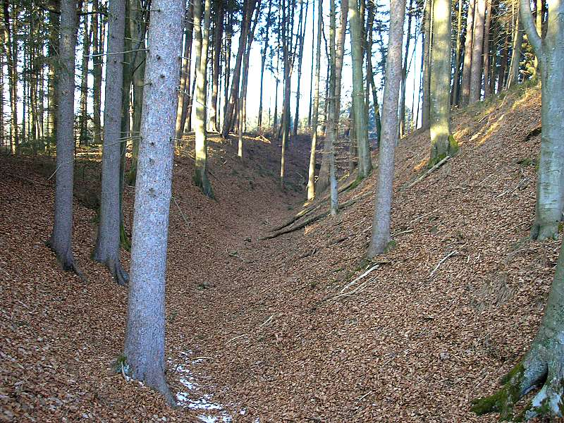 Burgstall Burgadelzhausen.